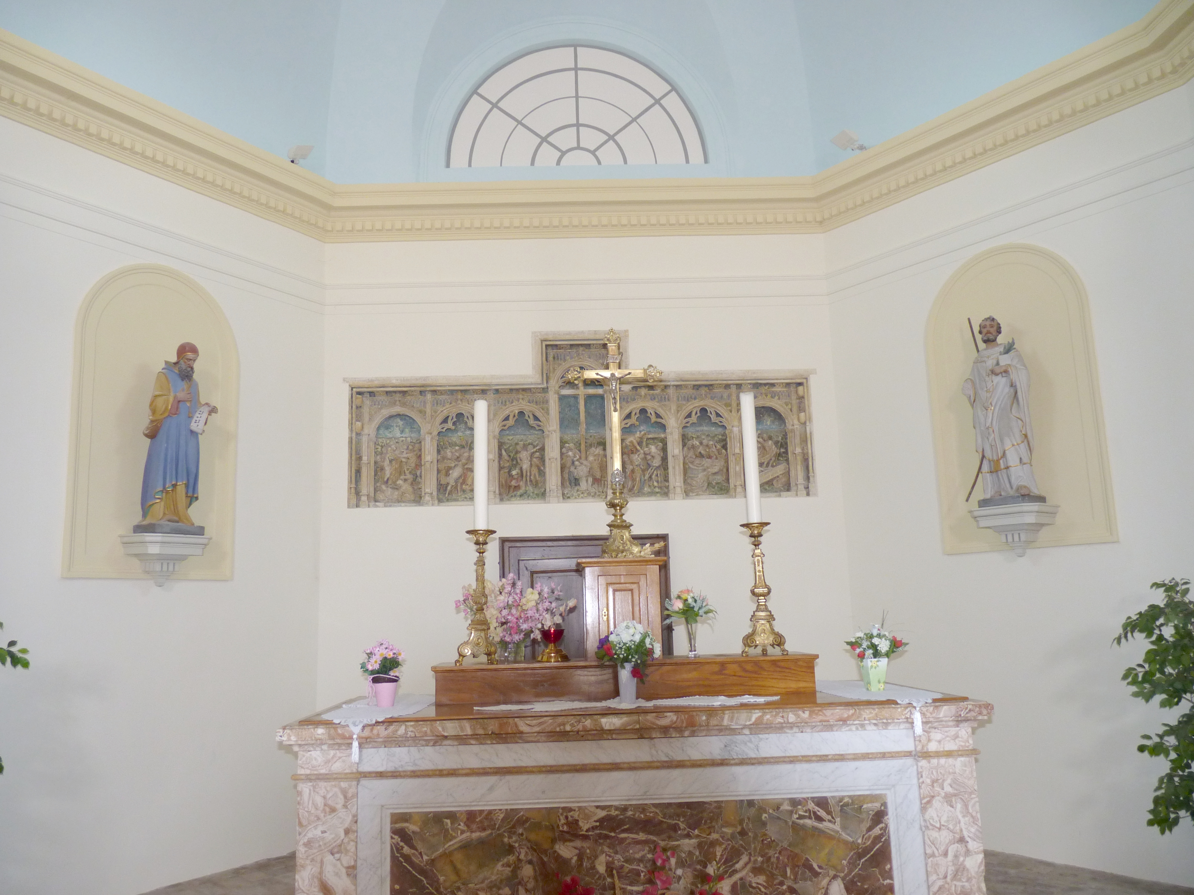 Chœur, autel et retable de l'église paroissiale Saint-Vincent, Bessey-lès-Cîteaux (Côte d'Or, Bourgogne, France)